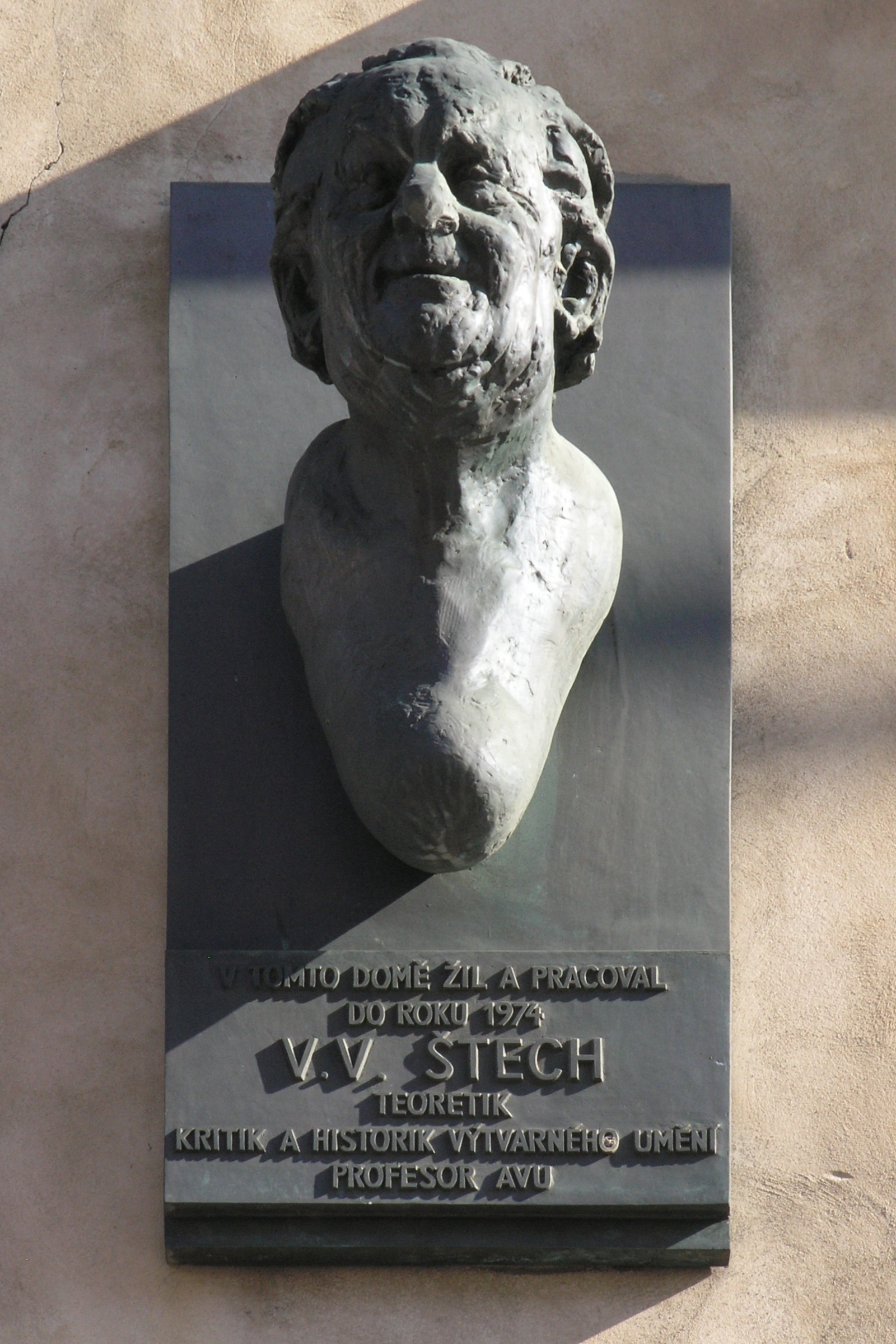 Praha, Malá Strana - busta a pamětní deska Václava Viléma Štecha na fasádě domu zvaného U zlatého lva (Nerudova 32)